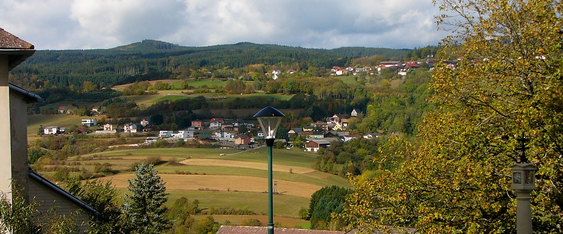 Unter- und Obererla; Ortsteile von Maria Taferl.